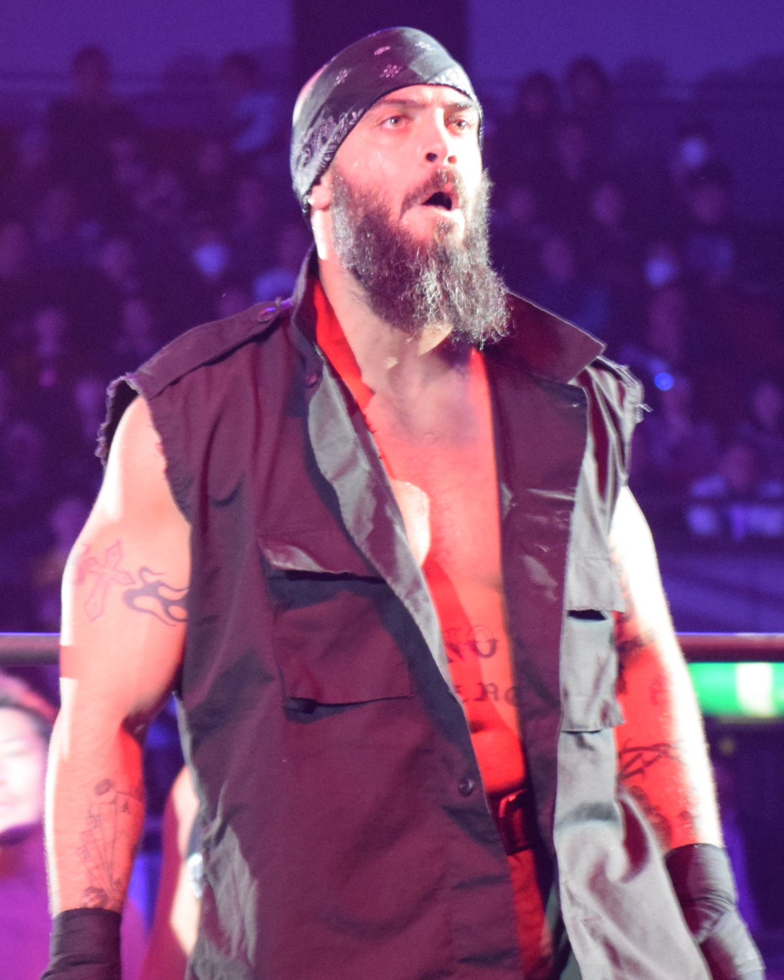 2016年2月11日 大阪府立体育会館 「THE NEW BEGINNING in OSAKA」 ジェイ・ブリスコ